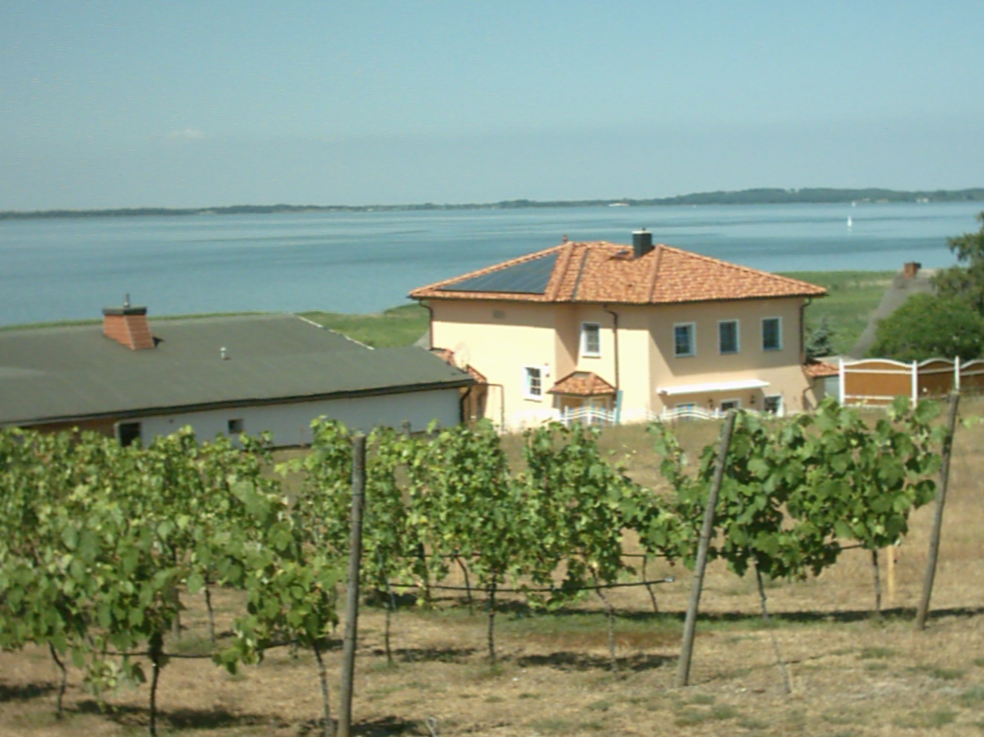 Der nördlichste Weinberg Deutschlands in Loddin (Usedom)